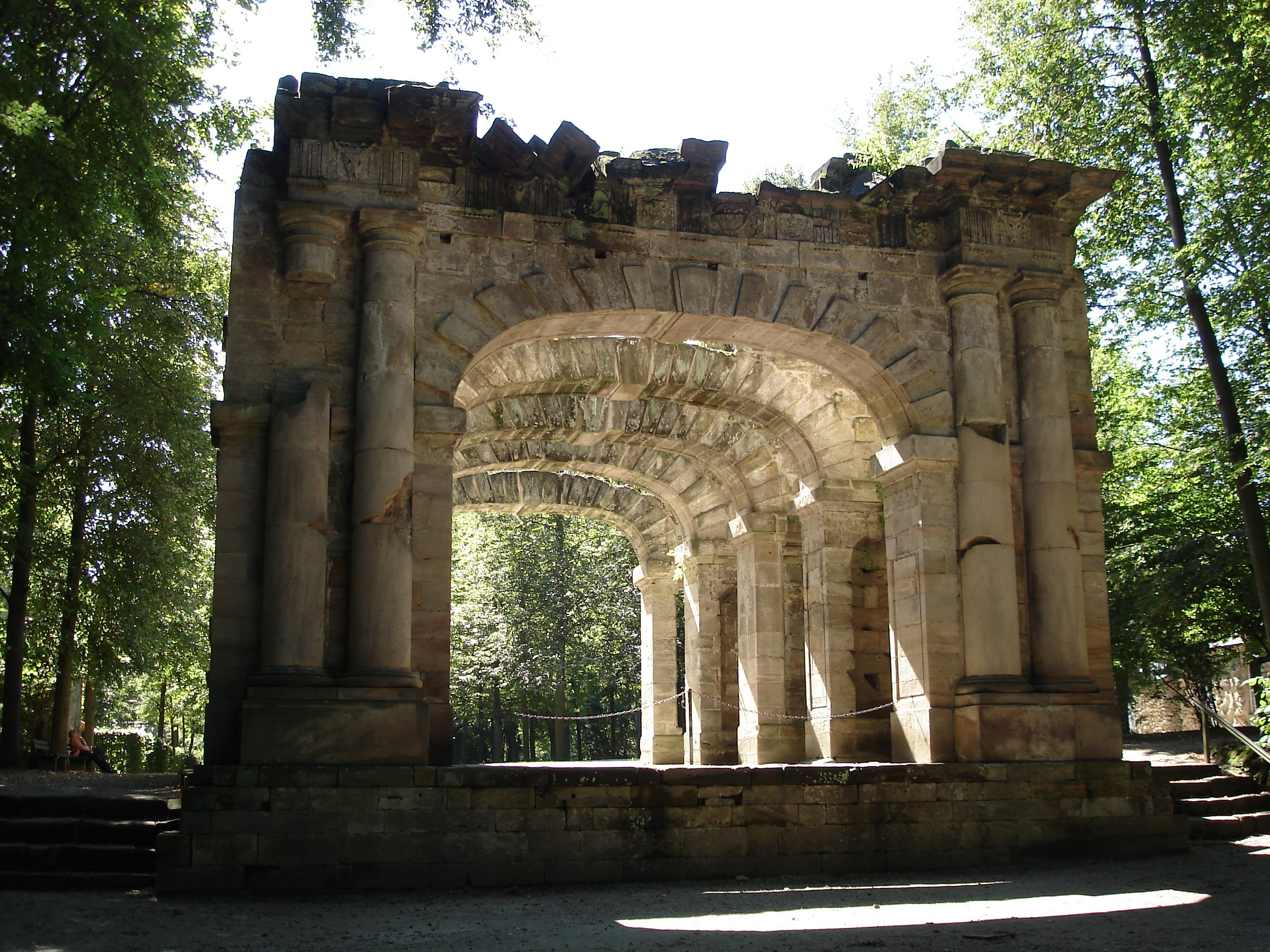 Bayreuth, "Römisches Theater" in der Eremitage (pseudoantikes Monument, 1743)